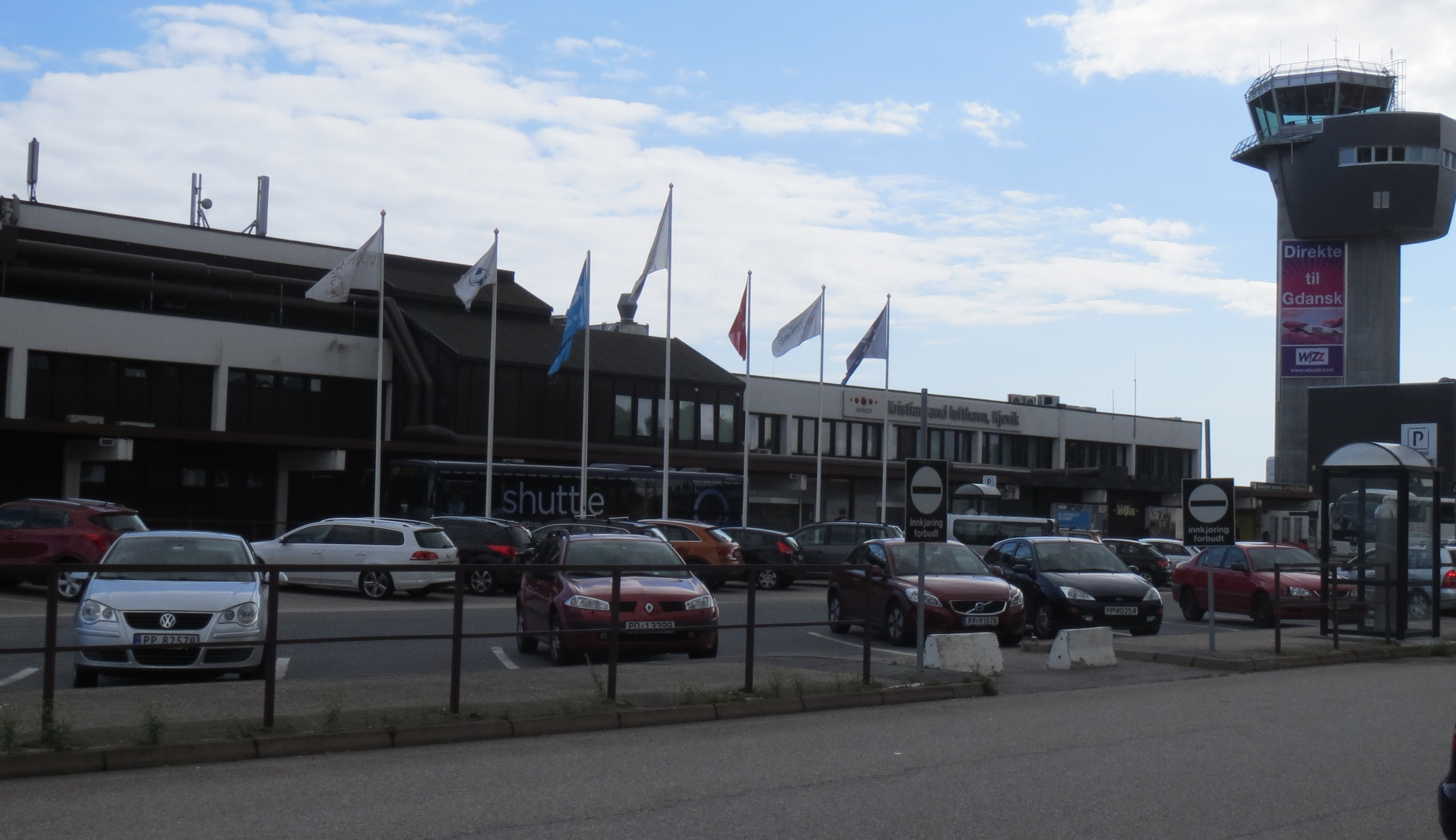 Kristiansand lufthavn, Kjevik med nytt tårn, 2013